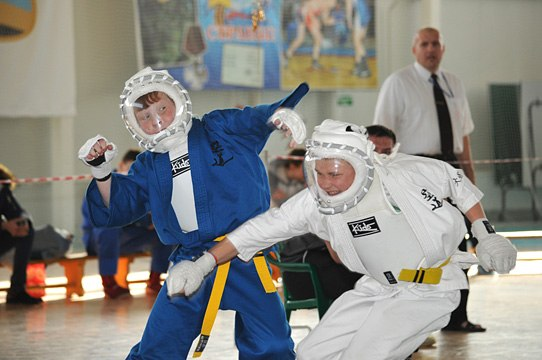 Поединок по правилам КУДО среди юношей (отчетливо видны защитные кирасы, сертифицированные KIF)